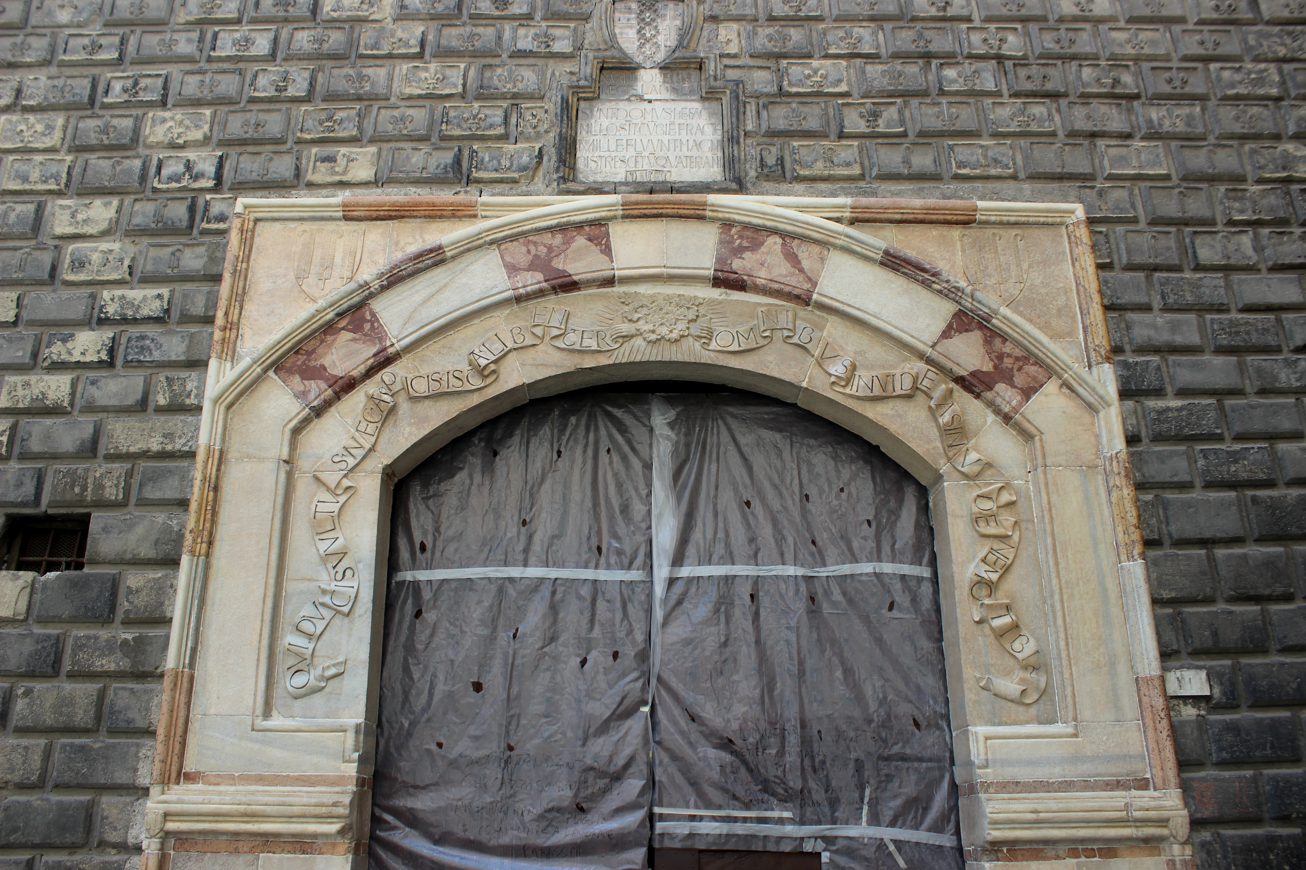 Nápoles. Palacio Penne.